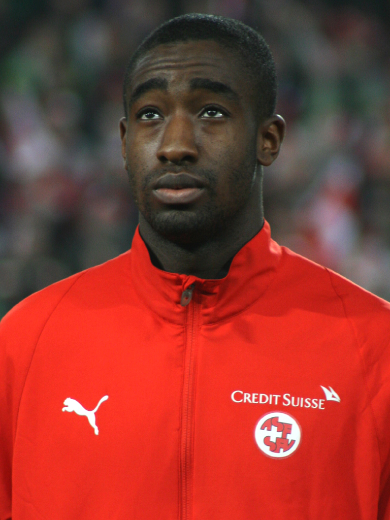 Johan Djourou, St. Jakob Stadion, Basel (Switzerland), Switzerland - Brasil 1:2